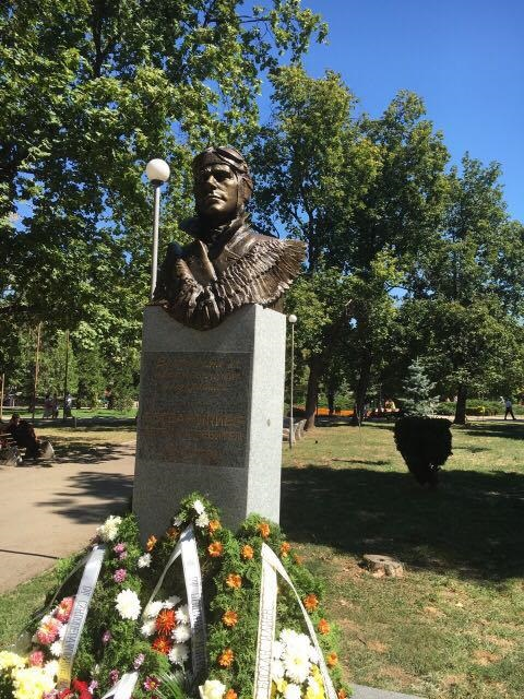 Паметник на Богдан Илиев в гр.Монтана